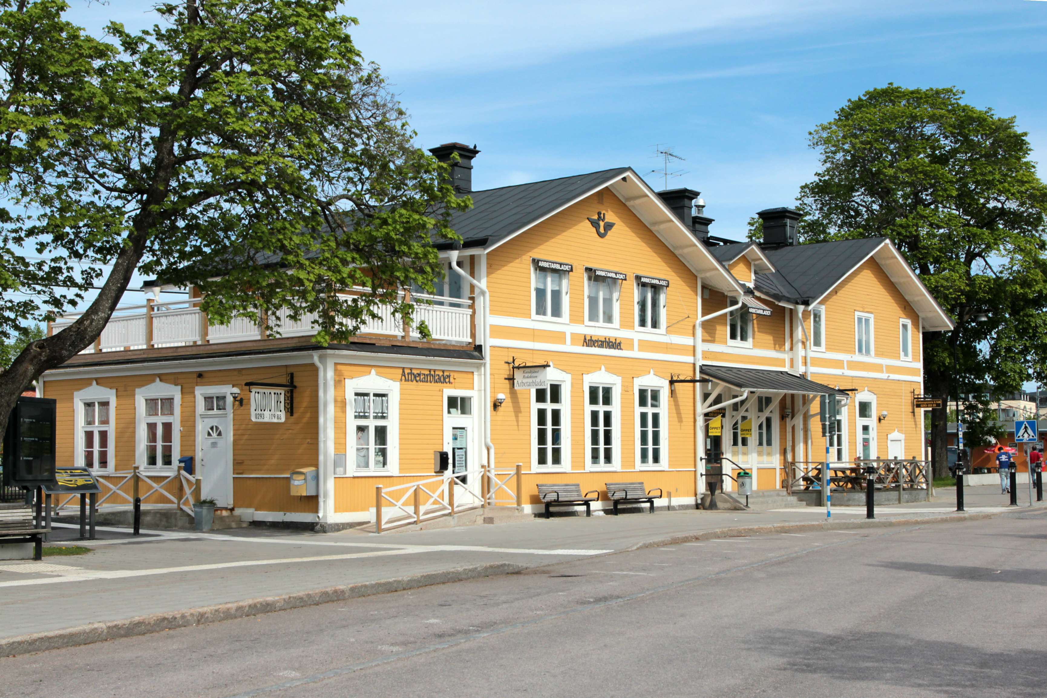 Tierps järnvägsstation, byggd 1874. Fick sitt nuvarande utseende vid ombyggnaden 1905. Foto uppladdat som en del i Bergslagssafarin 26 maj 2012.